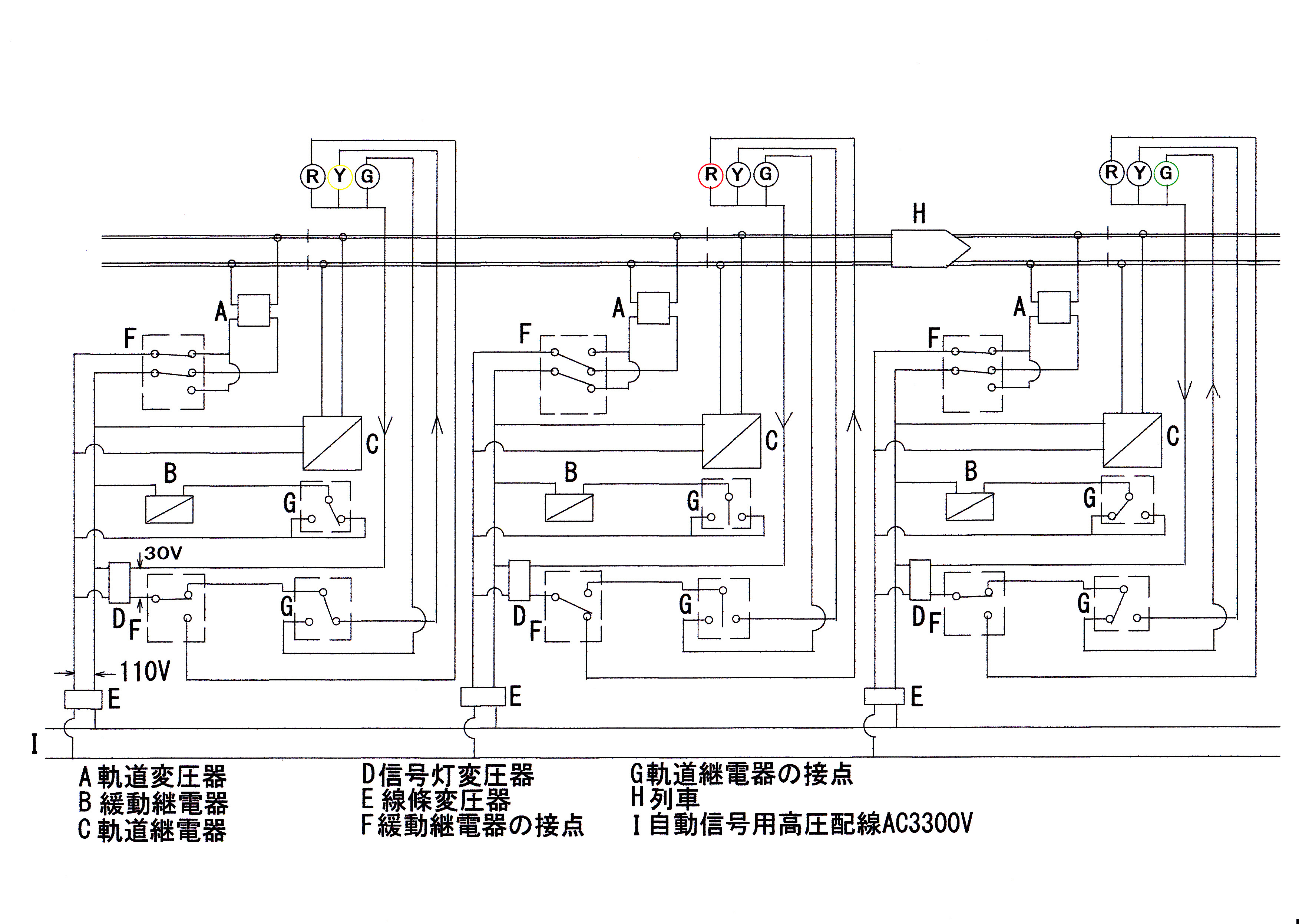 2元3位式自動信号機の作動回路のモデル図